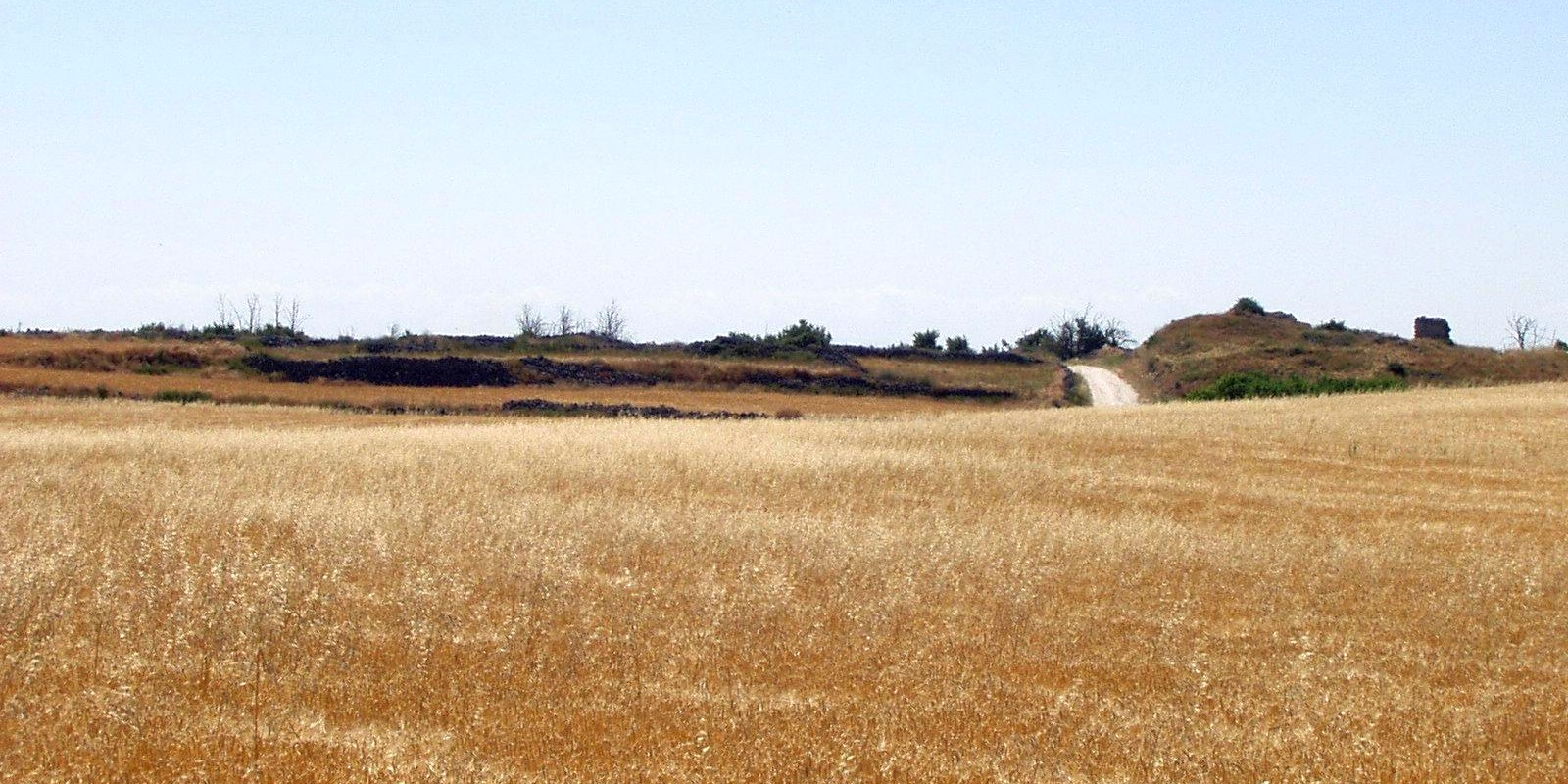 SAn Llorente. Jarrubia. Cebada. Arrenes. Torreón. Valle del Cuco. Campo de Peñafiel. Comunidad de Villa y Tierra de Curiel. Valladolid.